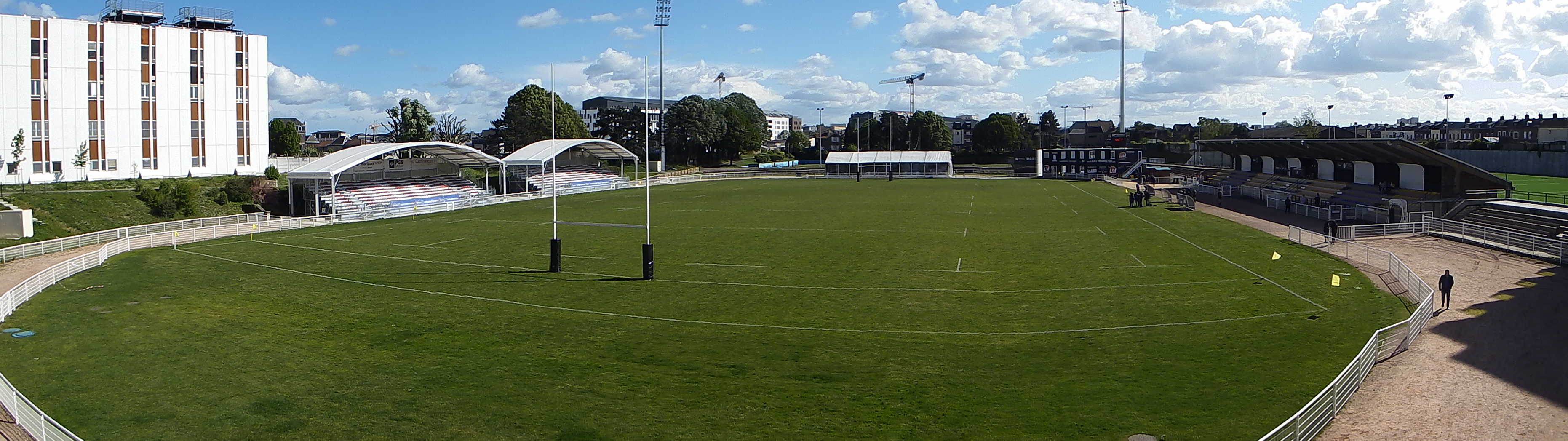 Le stade Jean-Mermoz, vu depuis l’hôtel Campanile.